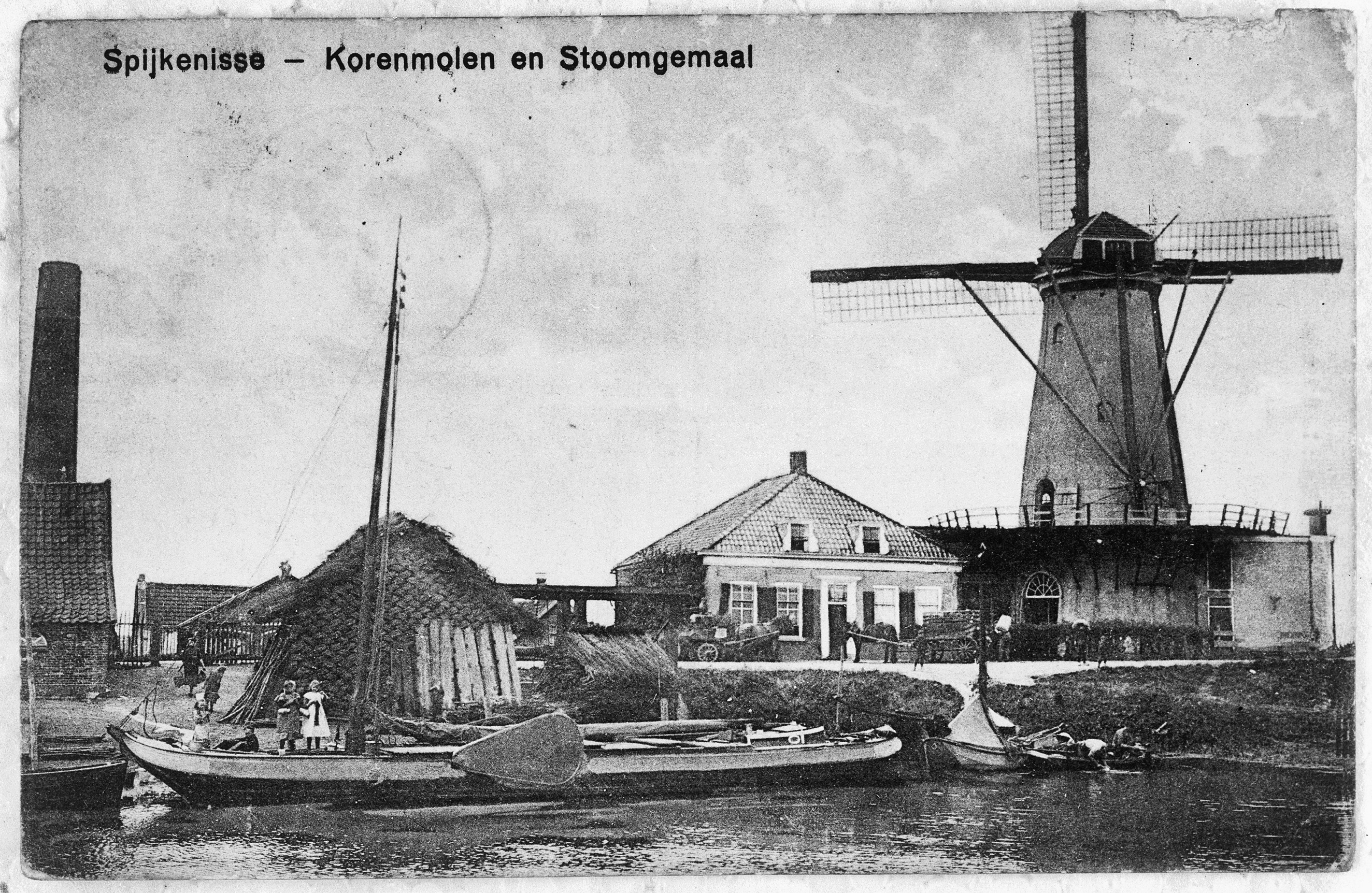 Molen Nooitgedacht en haven Spijkenisse (1909). Dit gedeelte van de haven is ± 1975 afgesloten waardoor er geen schepen meer kunnen komen, de molen is in 2009 opgehoogd.